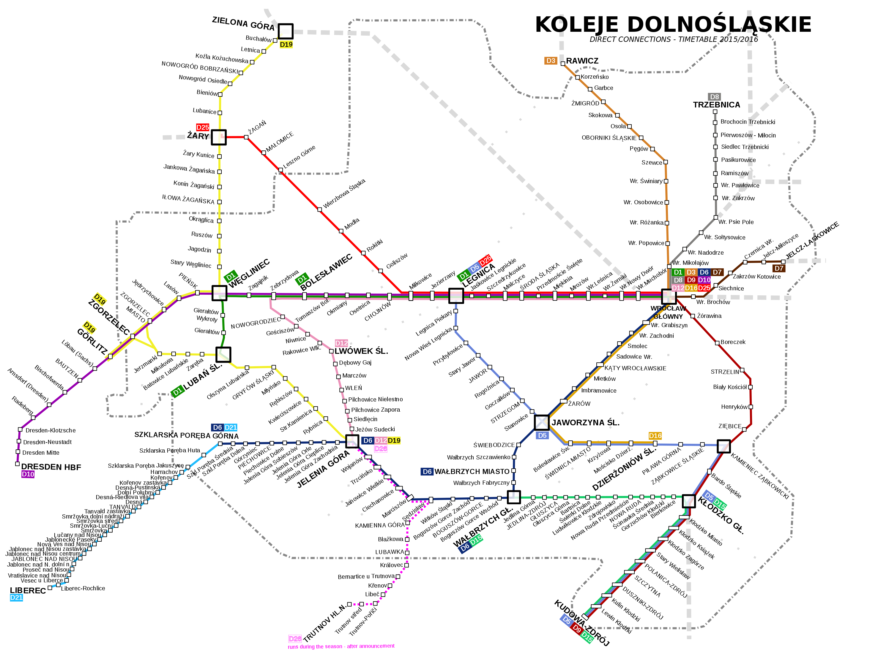 Schemat połączeń bezpośrednich KD w rozkładzie jazdy 2013/2014